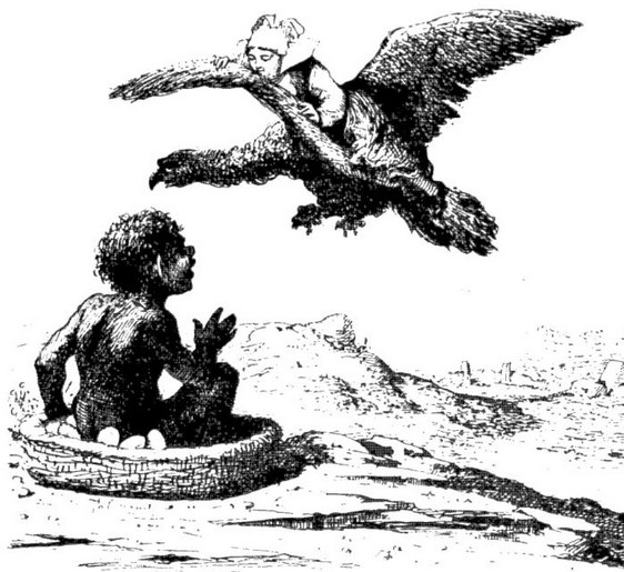 Illustration de Théophile Busnel pour le conte d'Emile Souvestre, la Groac'h de l'ïle du Lok